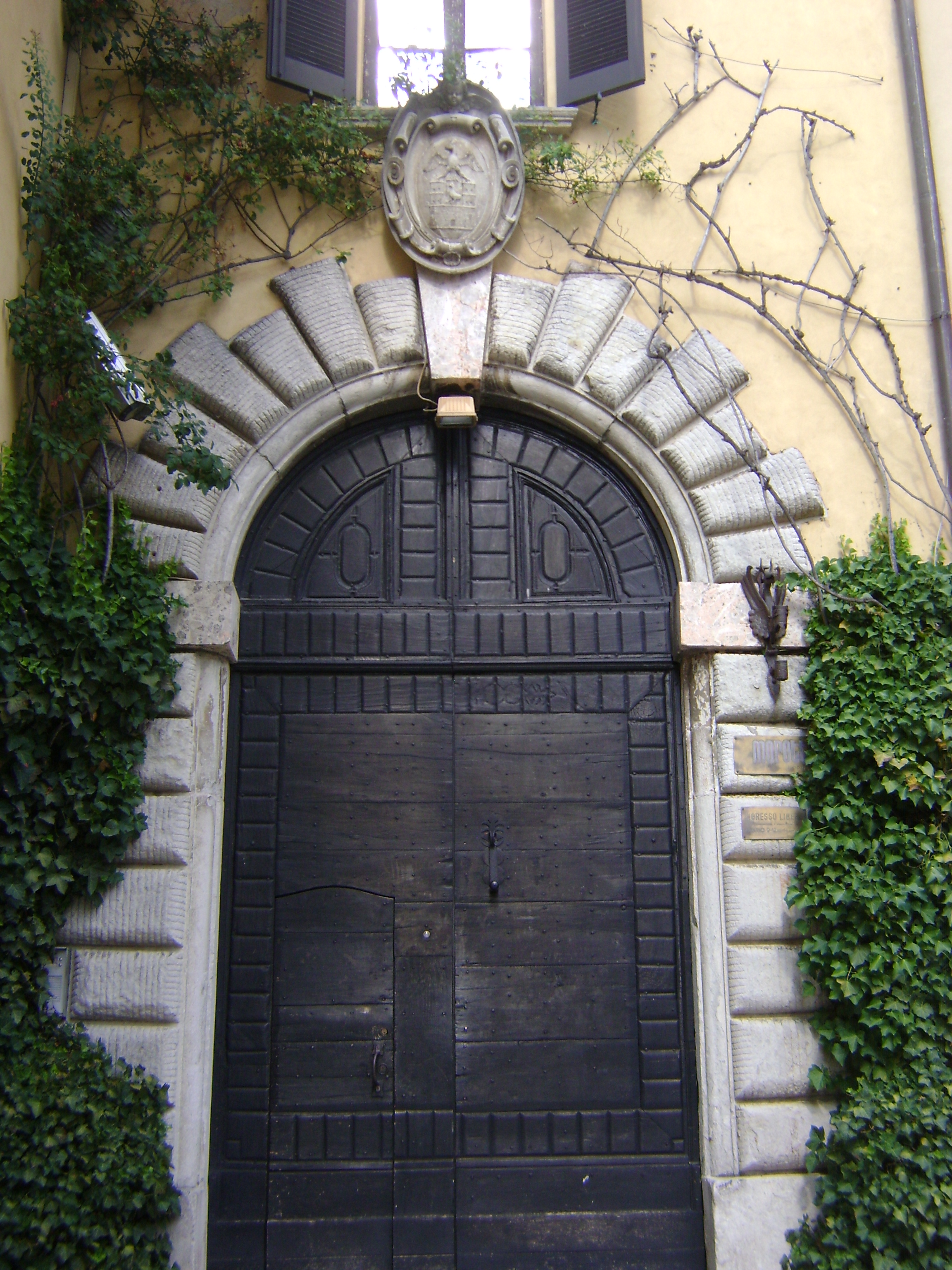 Ingresso del palazzo dei nobili Sessa di Daverio, adiacente alla Chiesa di Santa Maria Assunta, ex cappella di famiglia.